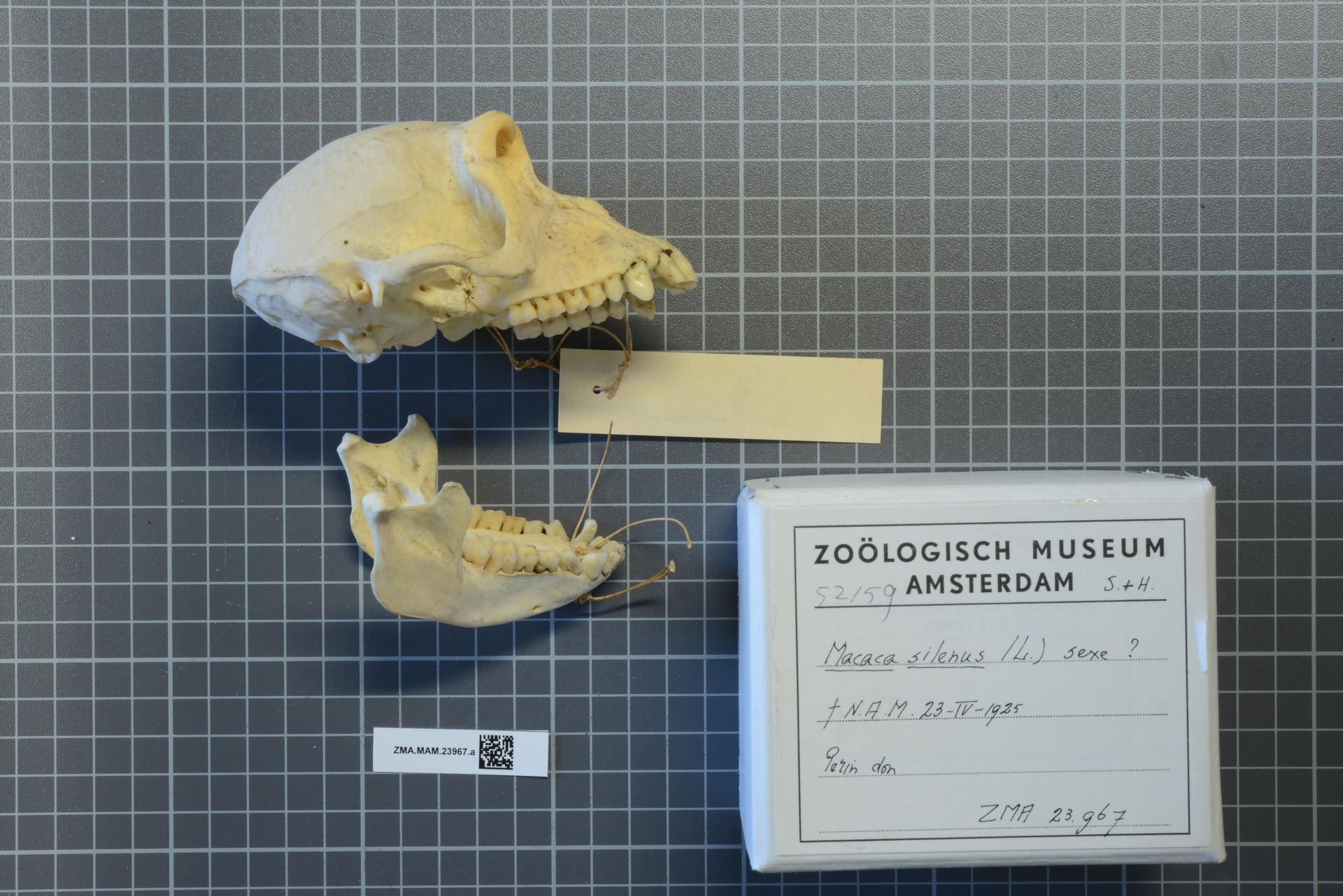 Macaca silenus Linnaeus